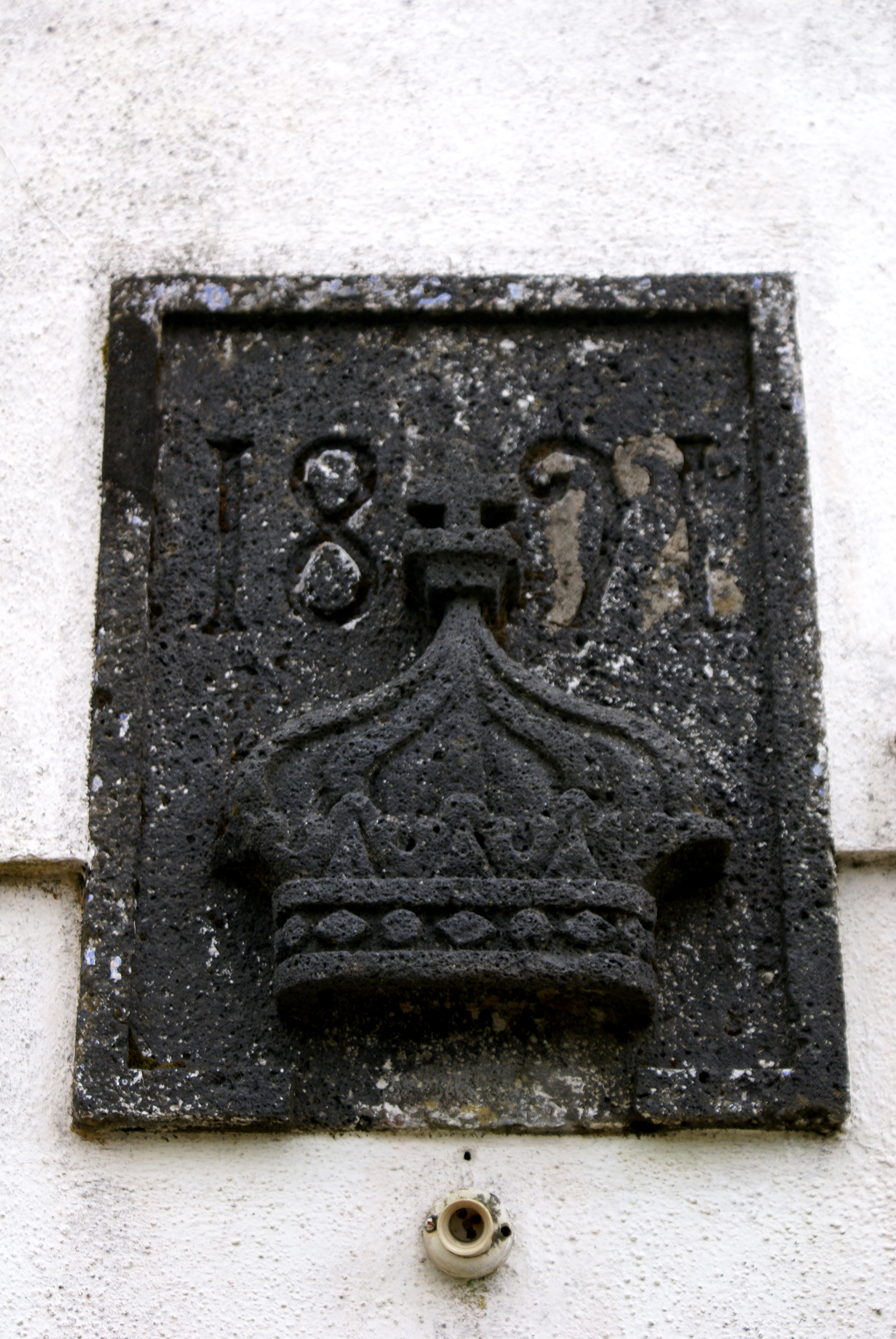 Pedra lavrada com coroa do Espírito Santo e data de 1891, Império do Espírito Santo do Toledo, Velas, ilhas de São Jorge, Açores